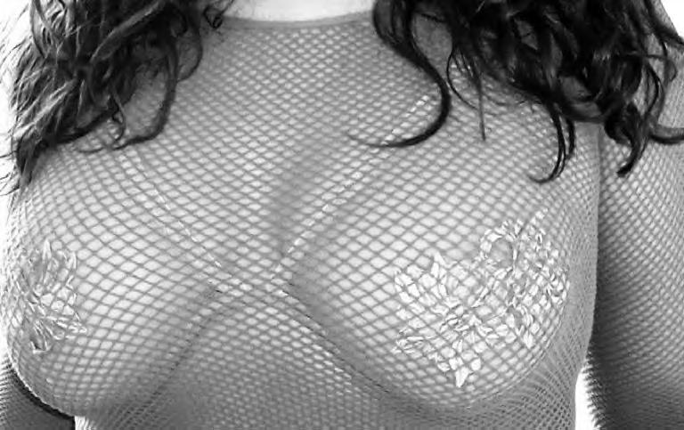 Erotiniais drabužiais aprengta moters krūtinė.